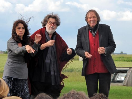 Les comédiens Marie Poumarat, Henri Ronse et Patrice Dehent